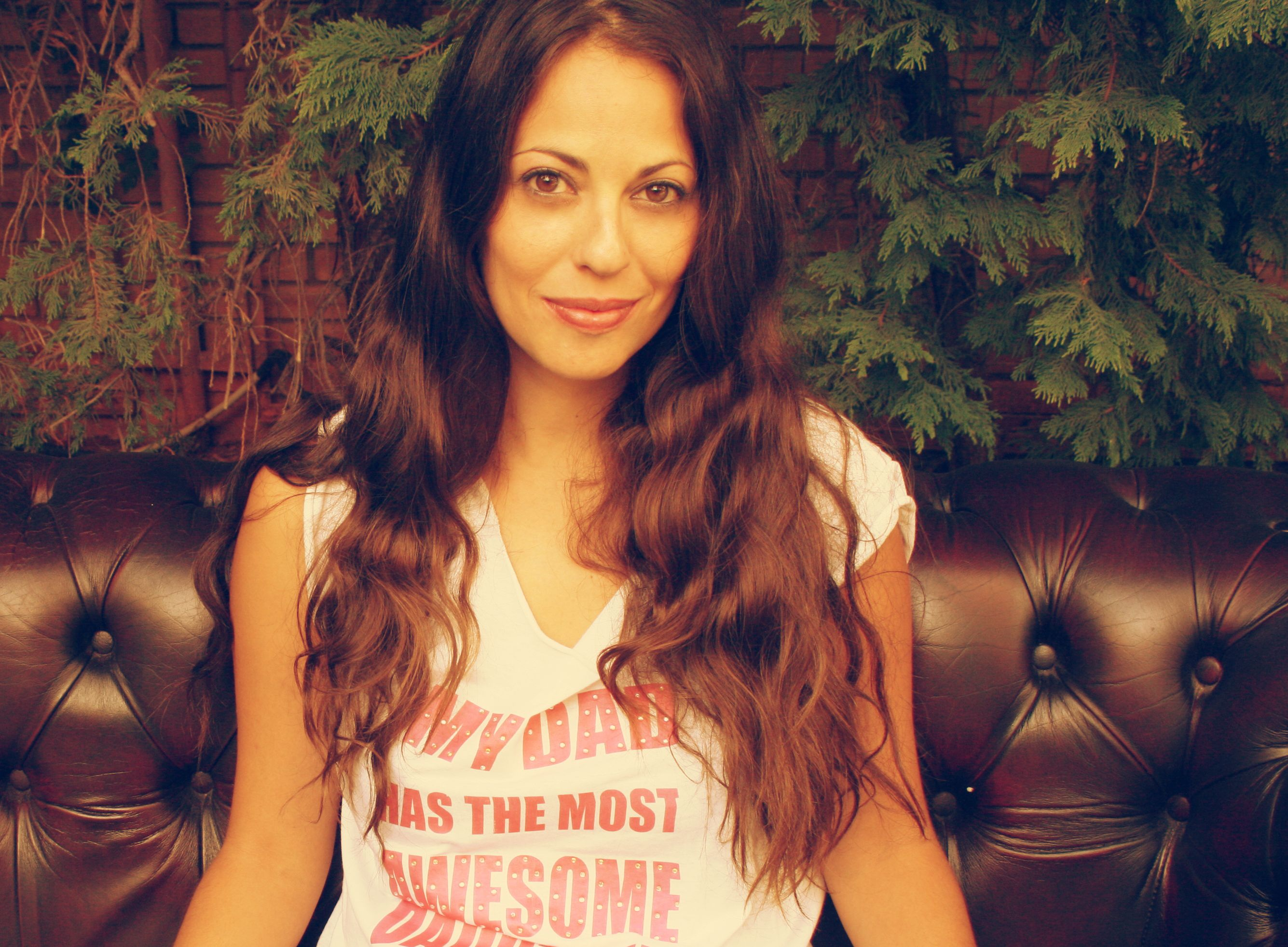 Πένυ Ραμαντάνη